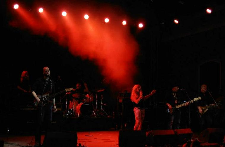 Bonnie Tyler koncertje Budapesten, Budavári Palota, Unique Festival